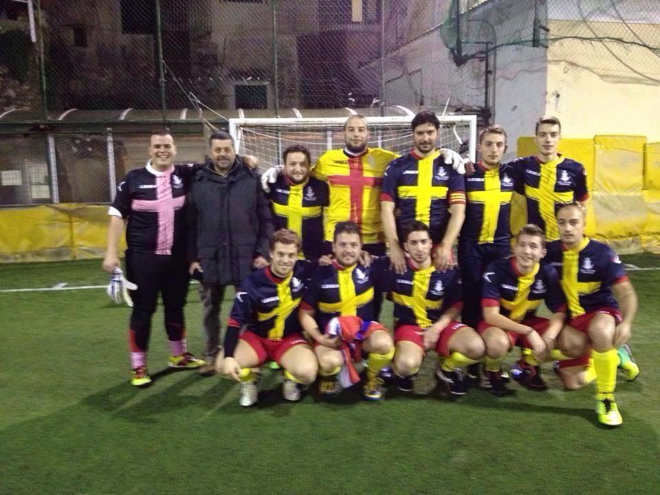 L'A.S.D. Castrum Pigellulae che milita nel campionato di Serie D - calcio a 5